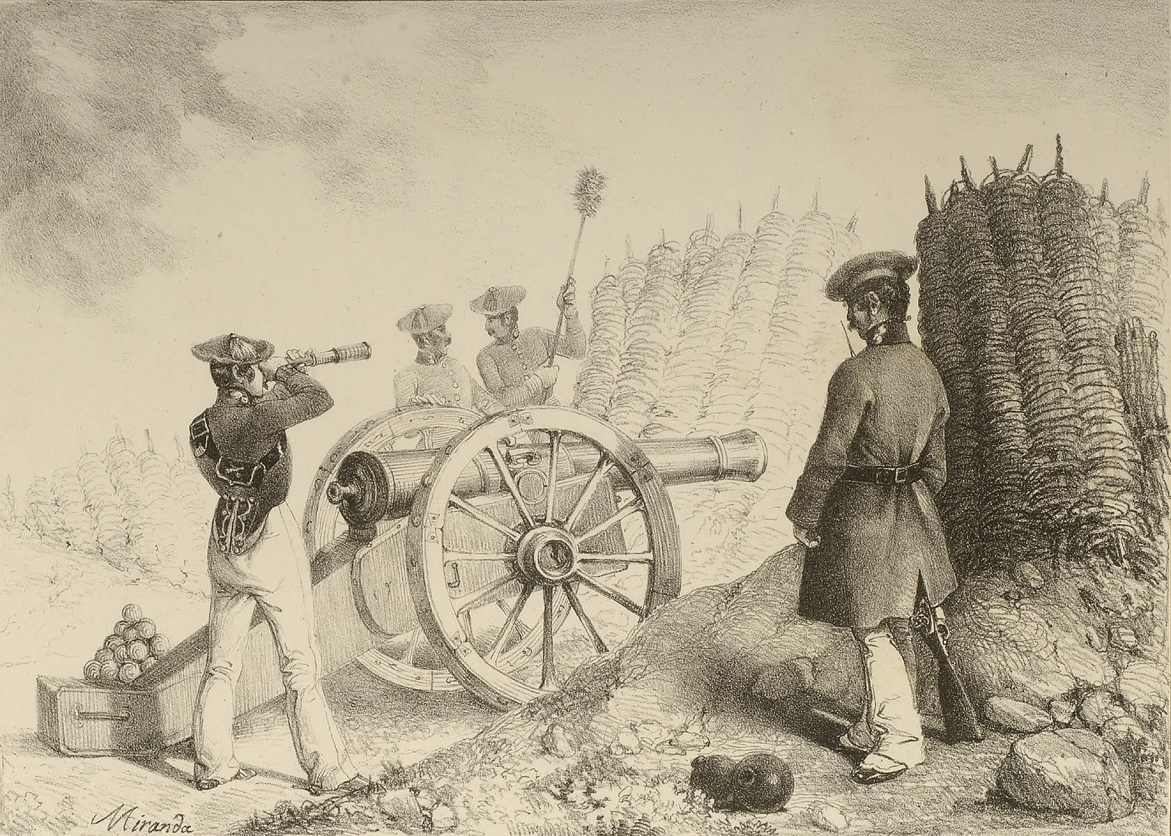 Artilleria karlista 1836an. Artillería carlista en 1836.